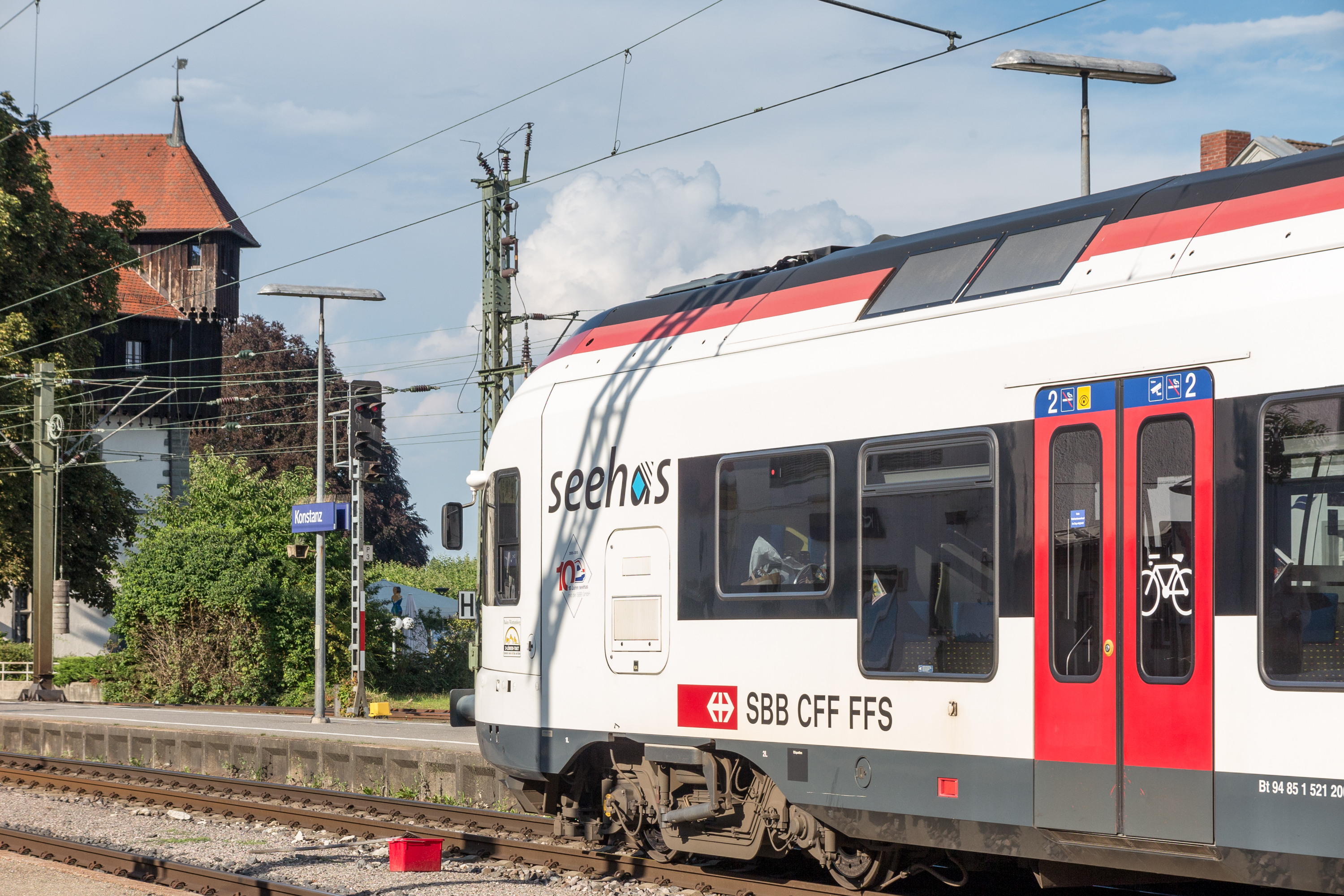 "Seehas" nach Engen im Konstanzer Bahnhof